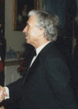 Mervyn Adelson